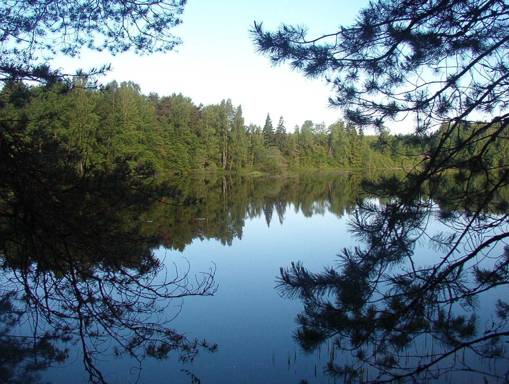 Река Улейма недалеко от стрелки с Юхотью